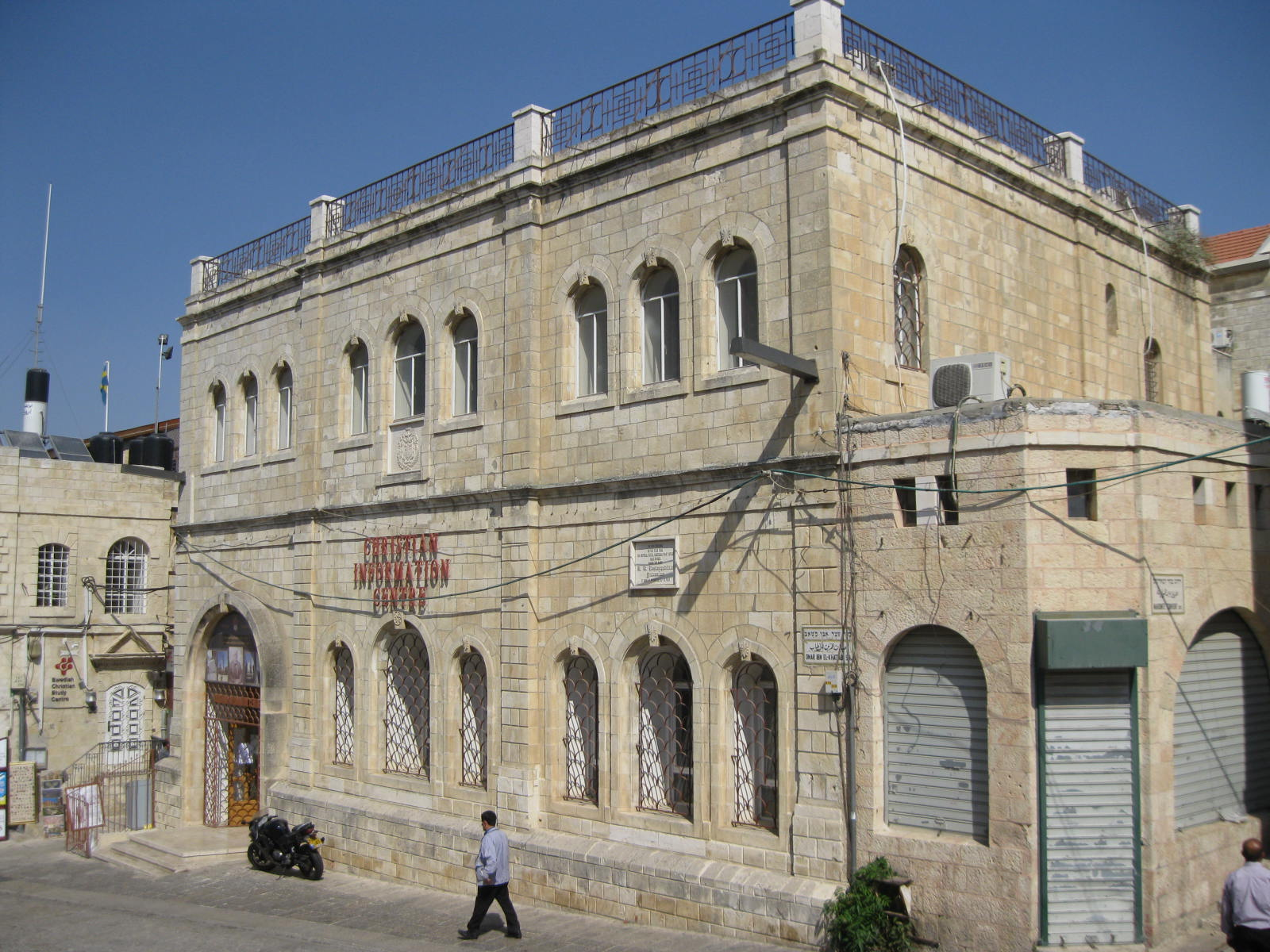 סניף בית דואר בעיר העתיקה מול מגדל דוד. שימש למעבר דואר עם הממלכה האוסטרית. בית הדואר האוסטרי היה החשוב בירושלים בעיקר בשל מהימנותו.